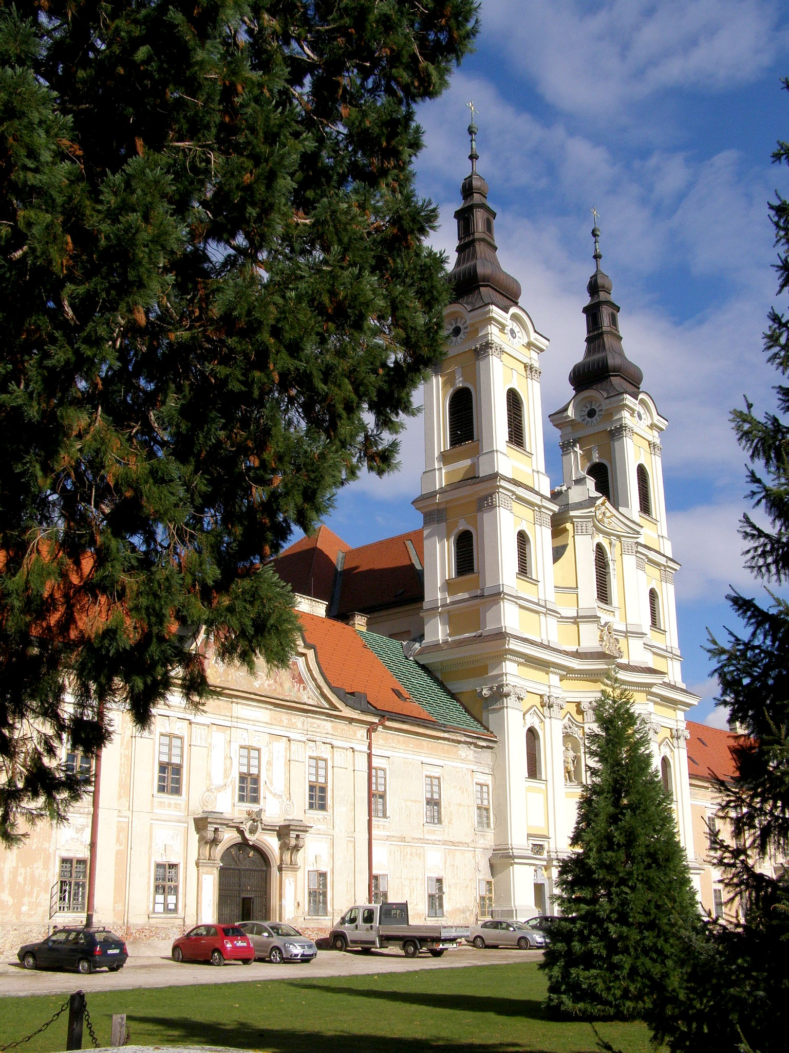 Pohľad na priečelie kláštora a kostola od juhozápadu